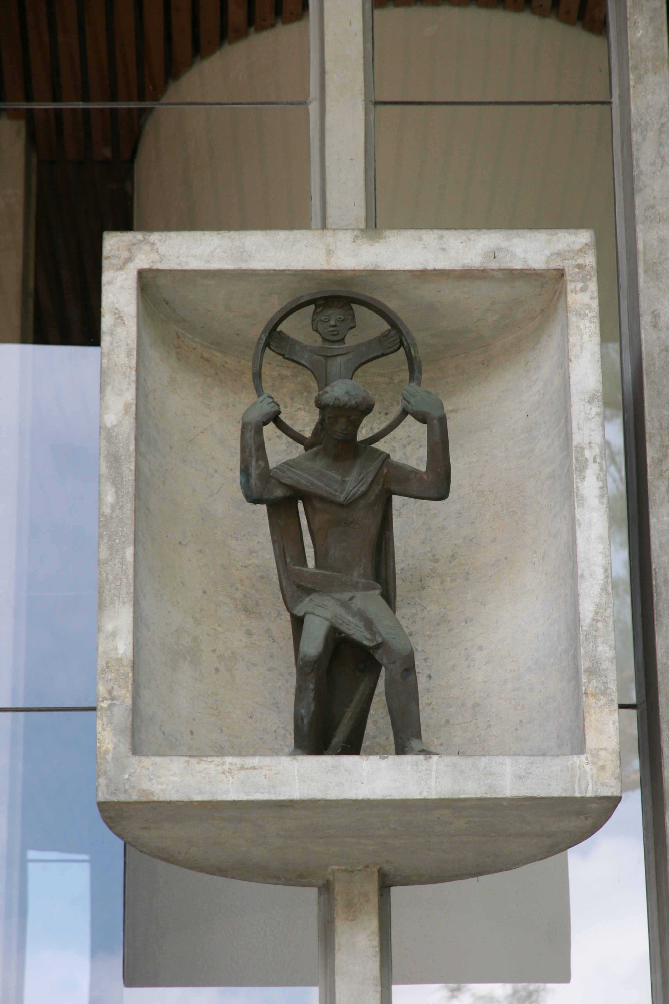 Römisch-katholische Pfarrkirche St. Christophorus Wangen an der Aare